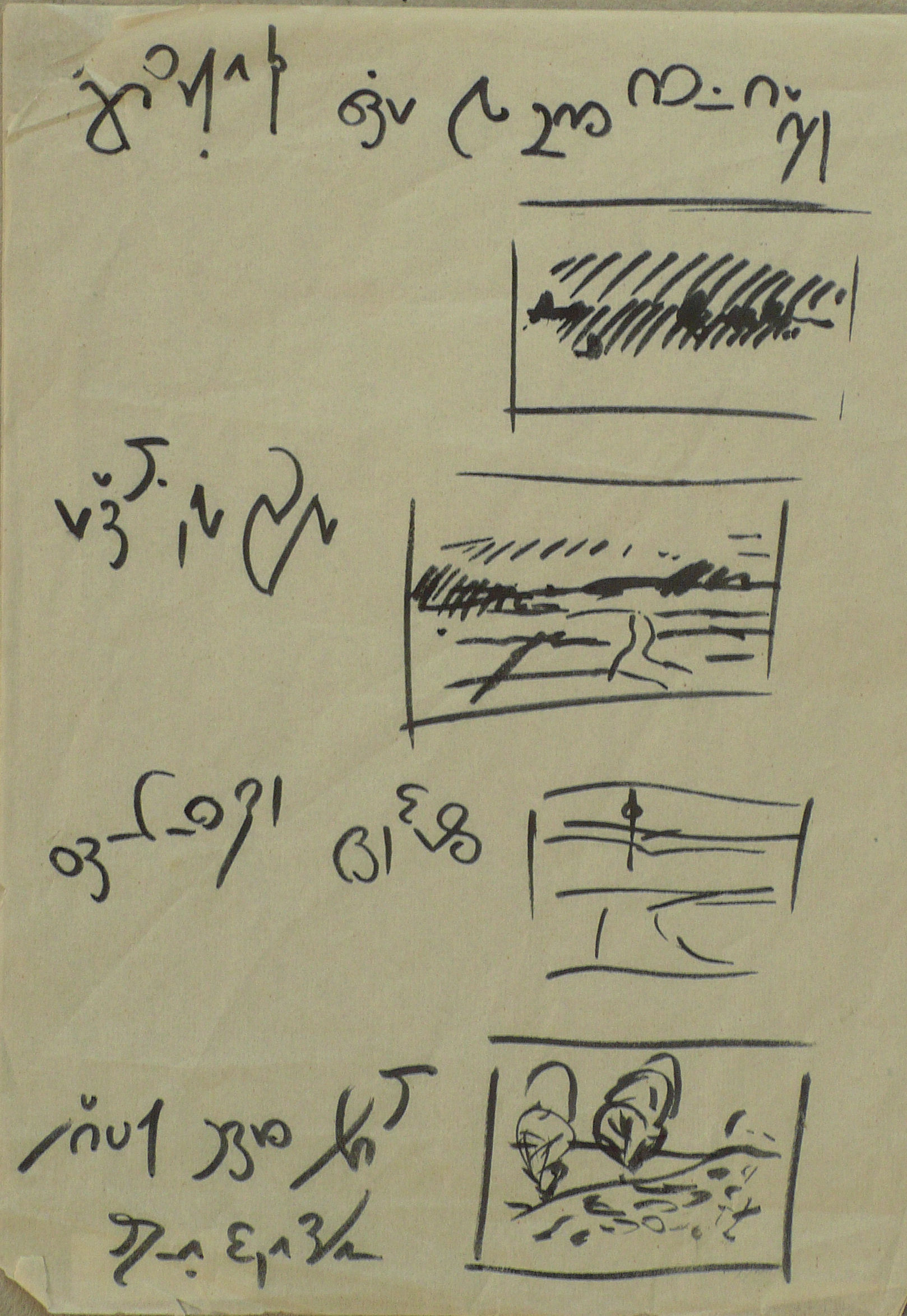 Eberhard Martin Schmidt, Aquarellkompositionen, 1951